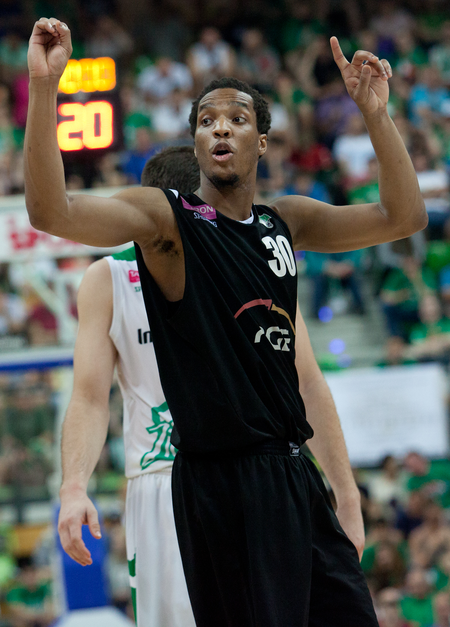 J.P. Prince PGE Turów Zgorzelec